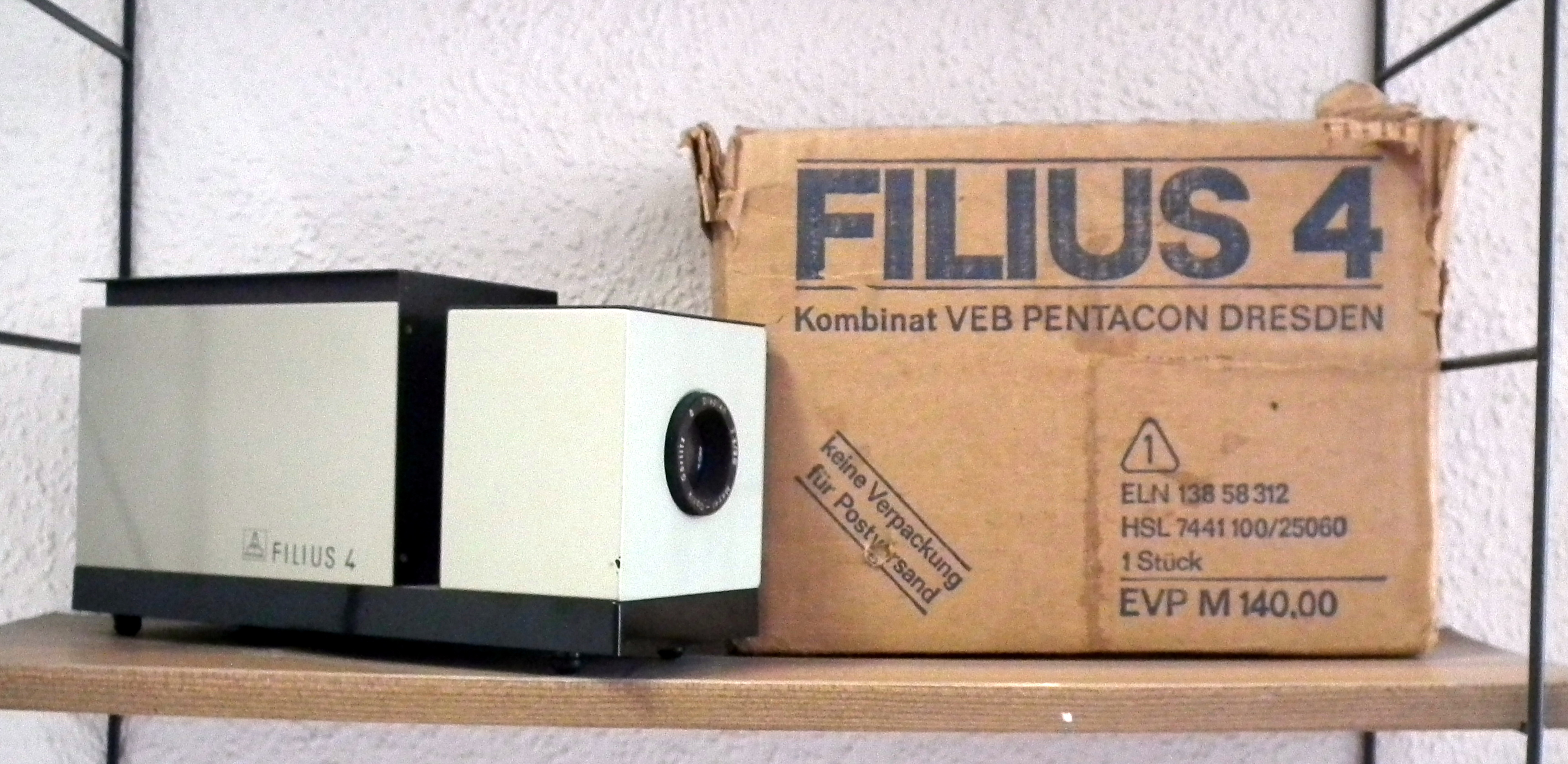 Filius 4 VEB Pentacon Dresden, DDR-Museum Pirna, Veröffentlicht mit Genehmigung der Museumsleitung